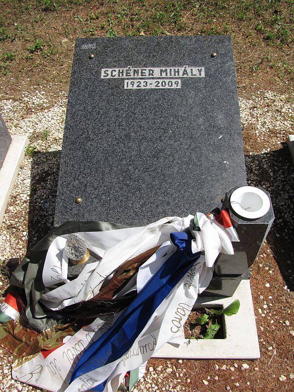 Schéner Mihály (Medgyesegyháza, 1923. január 9. - Budapest, 2009. május 11.) festő, grafikus, szobrász, keramikus és bábtervező sírja Budapesten. Óbudai temető: 31-1-12.